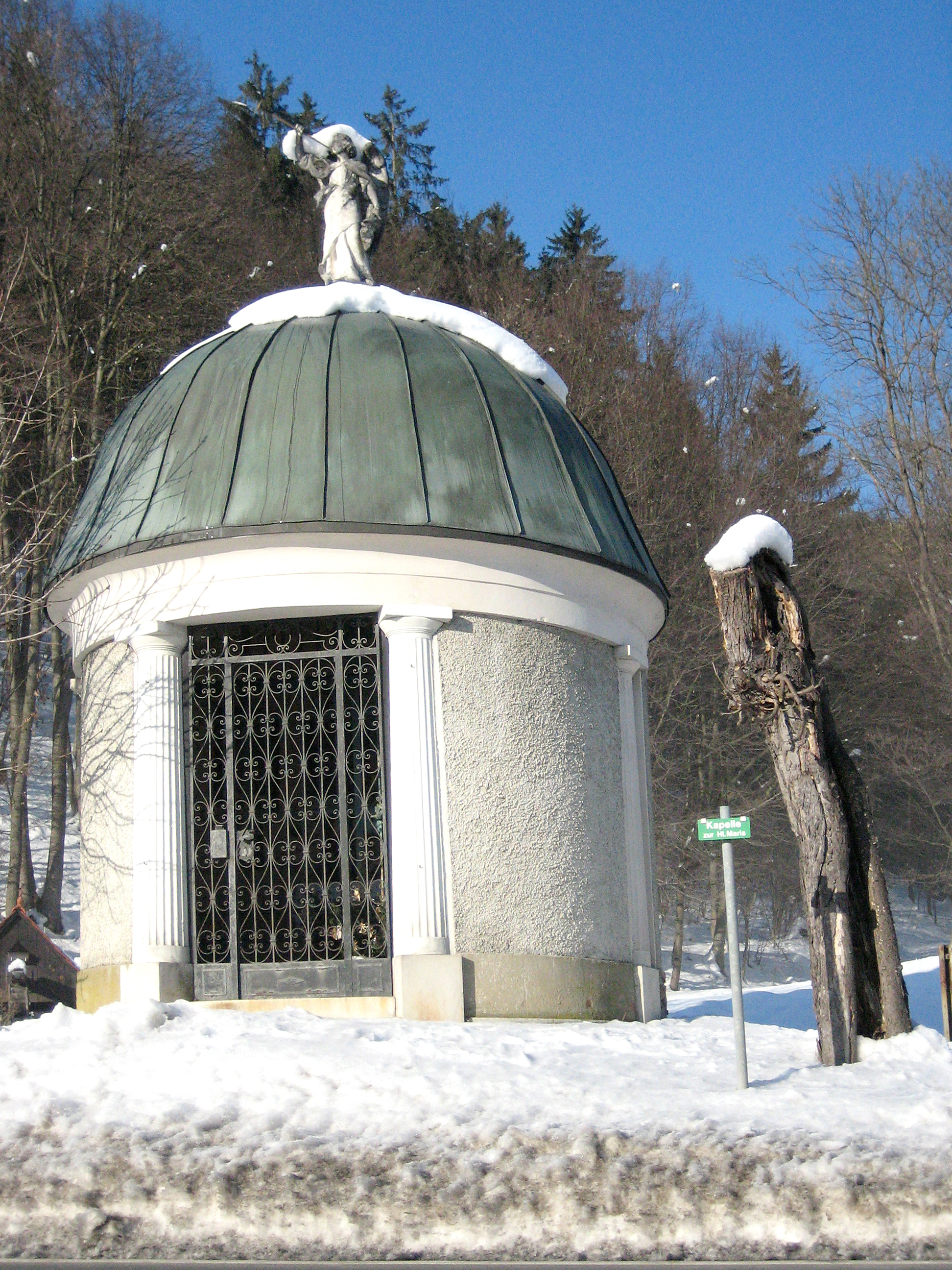 Sogen. Schwarzlkapelle